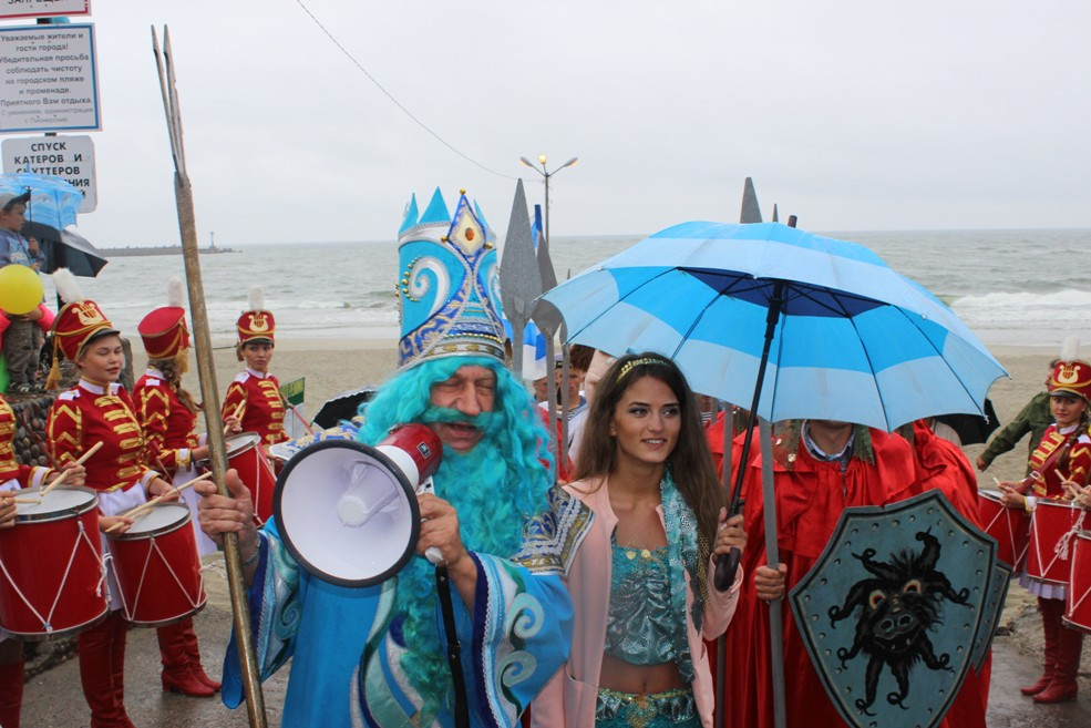 День Рыбака